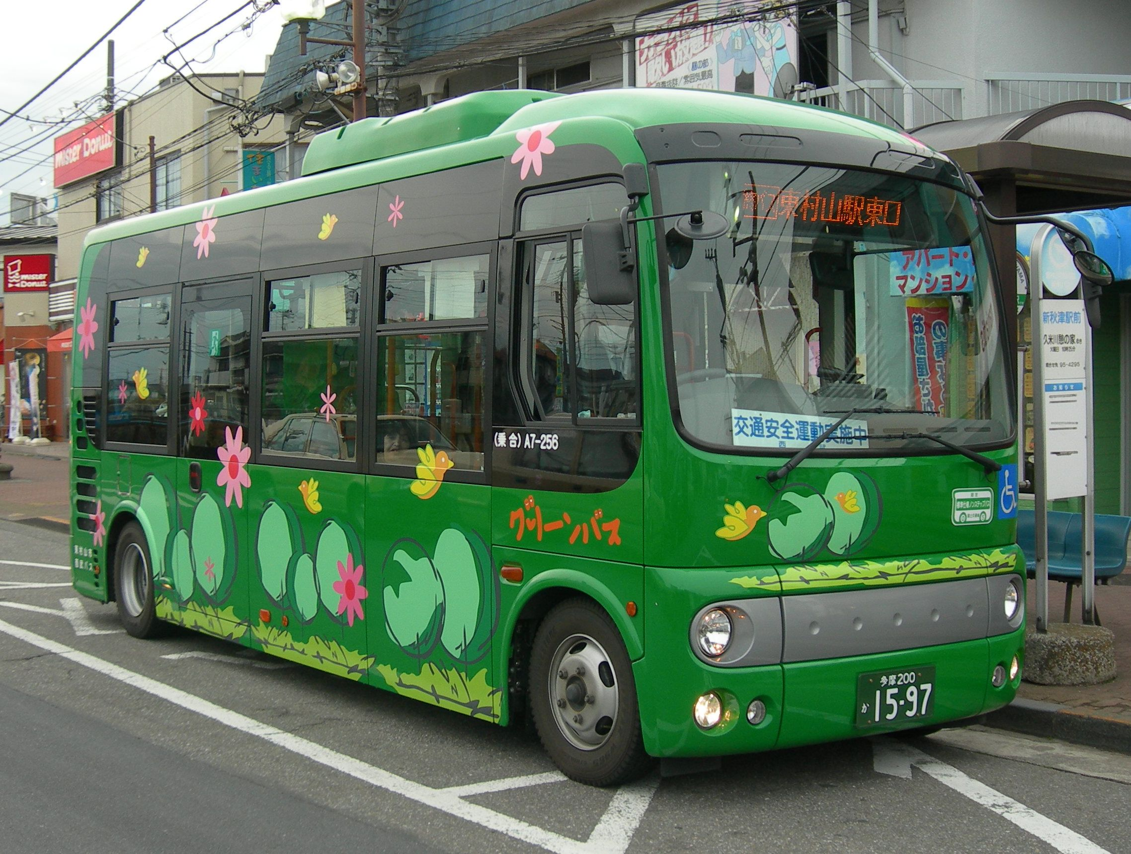 東村山市コミュニティバス「グリーンバス」